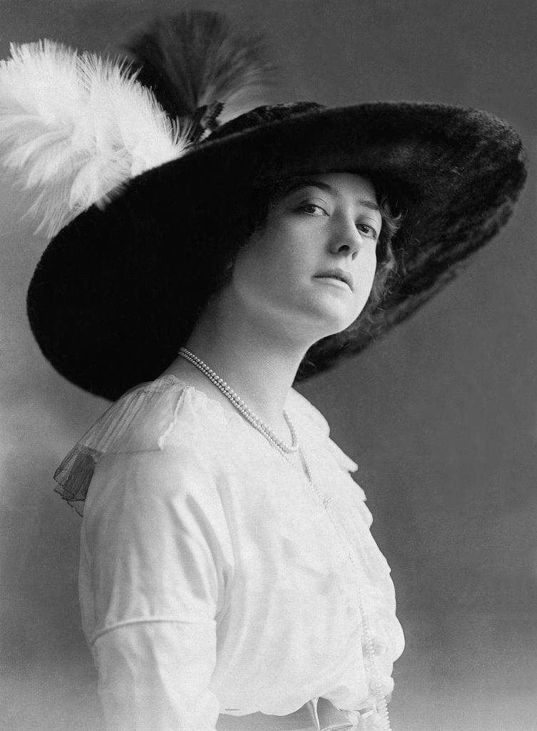 Dorrit Weixler